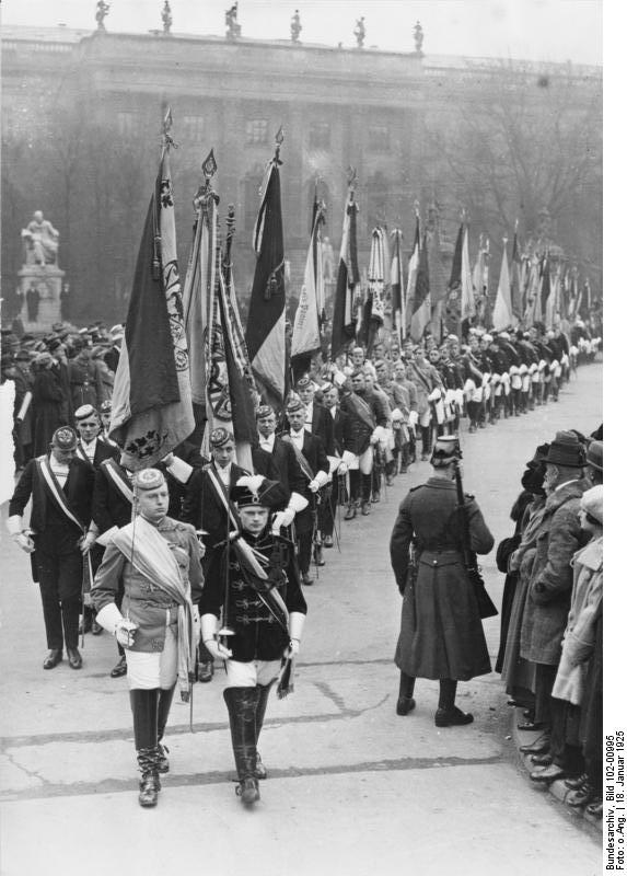 Angehörige studentischer Verbindungen an der Berliner Universität ziehen am 18. Januar 1925 zur Aula, um den Jahrestag der Reichsgründung 1871 zu feiern.